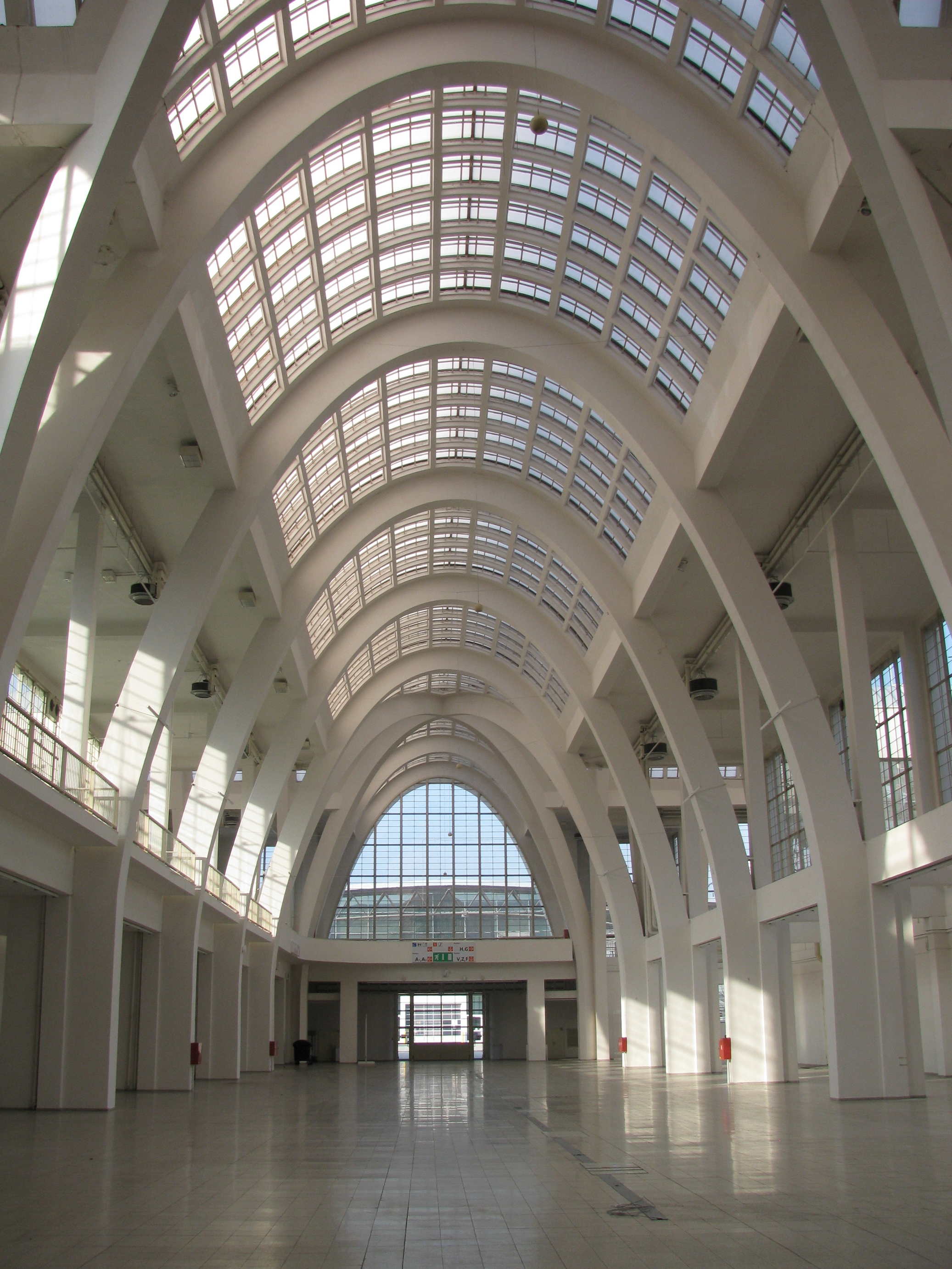 Brněnské výstaviště, interiér pavilonu A2 v době mimo konání výstav, pohled směrem k pavilonu V.